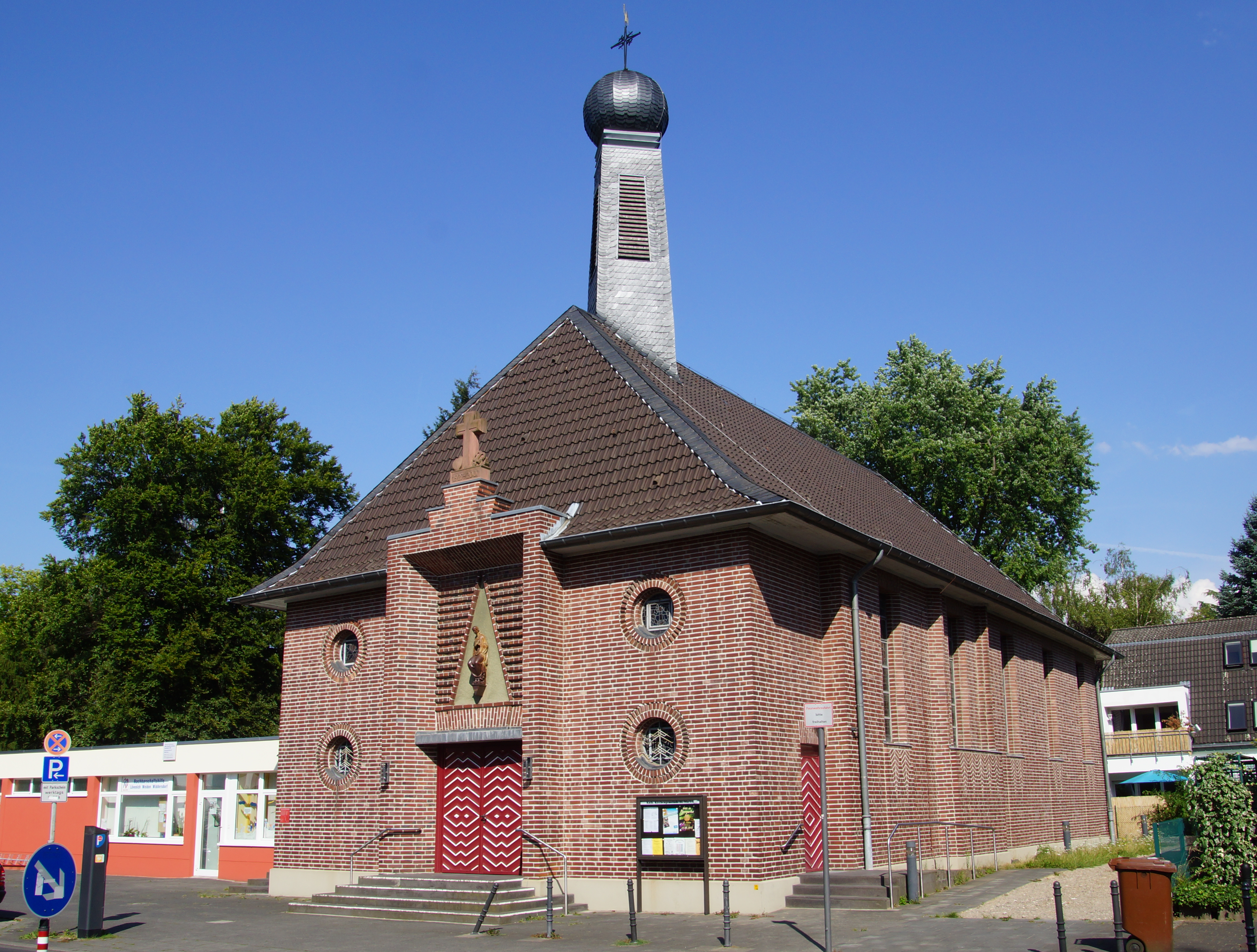 Baudenkmal katholische Kirche St. Marien in Weiden, Goethestr. 31